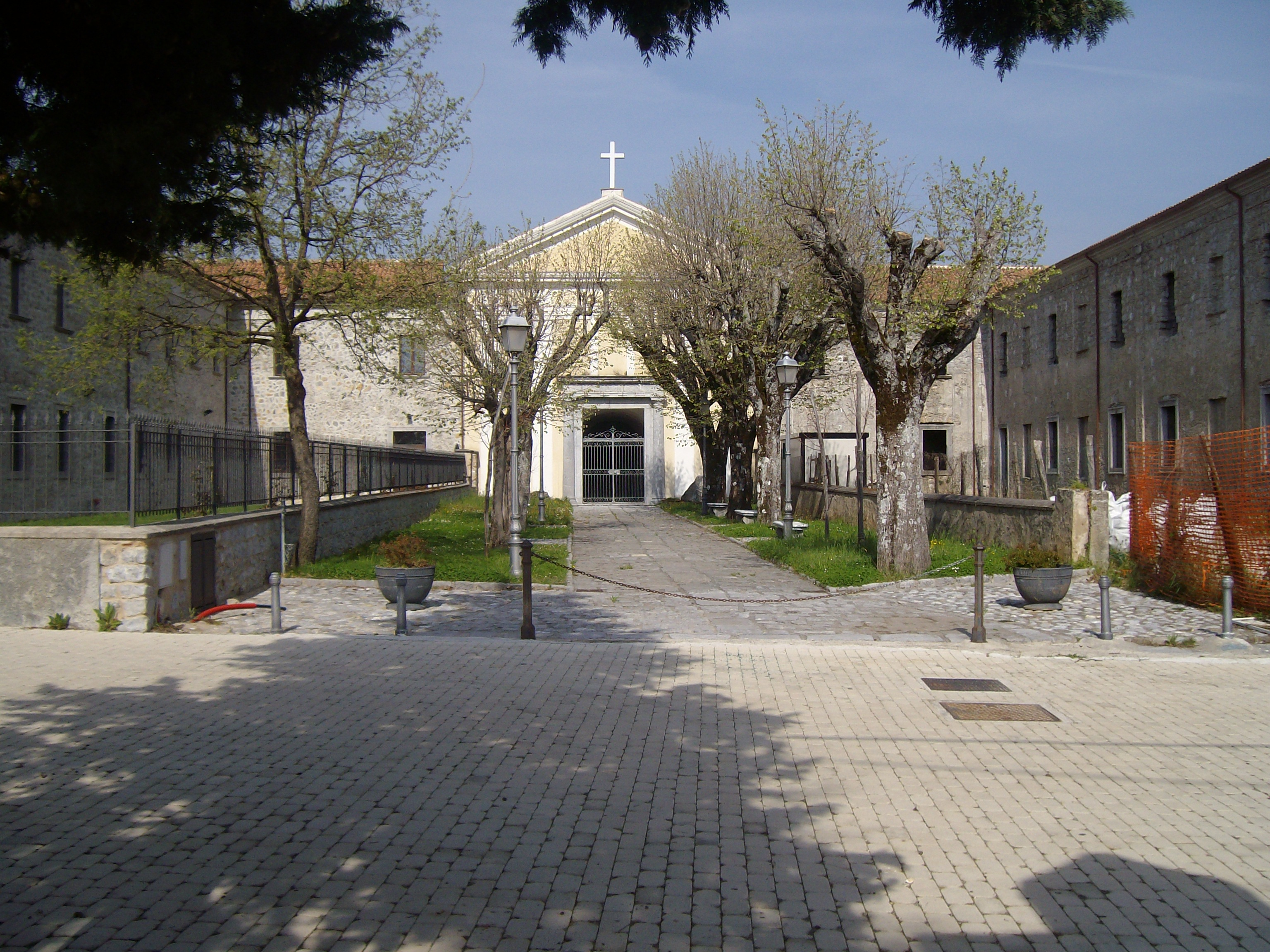 entrata santamaria